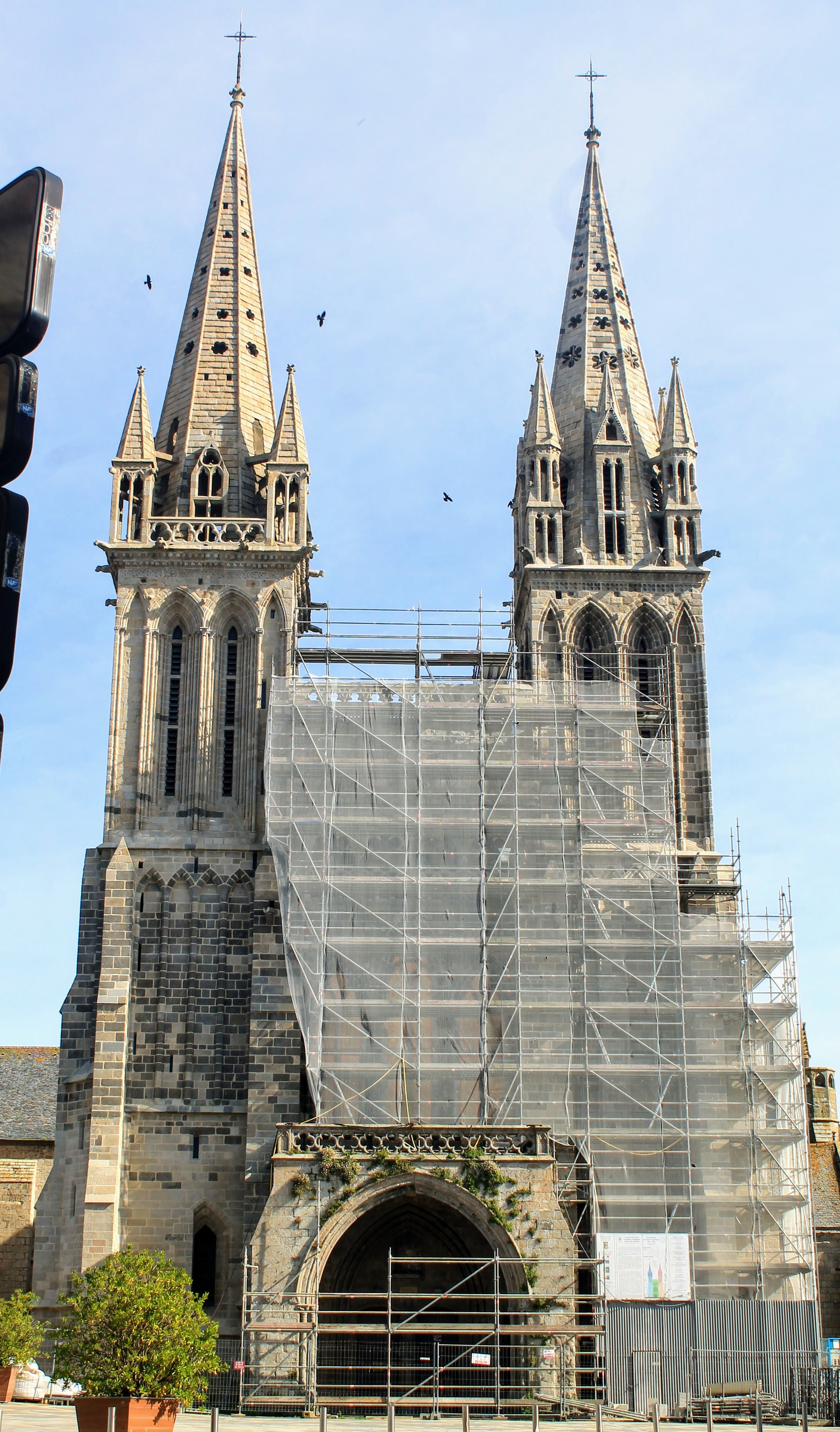 façade occidentale de la cathédrale Saint-Paul Aurélien de Saint-Pol-de-Léon (29250) en cours de rénovation (octobre 2019)